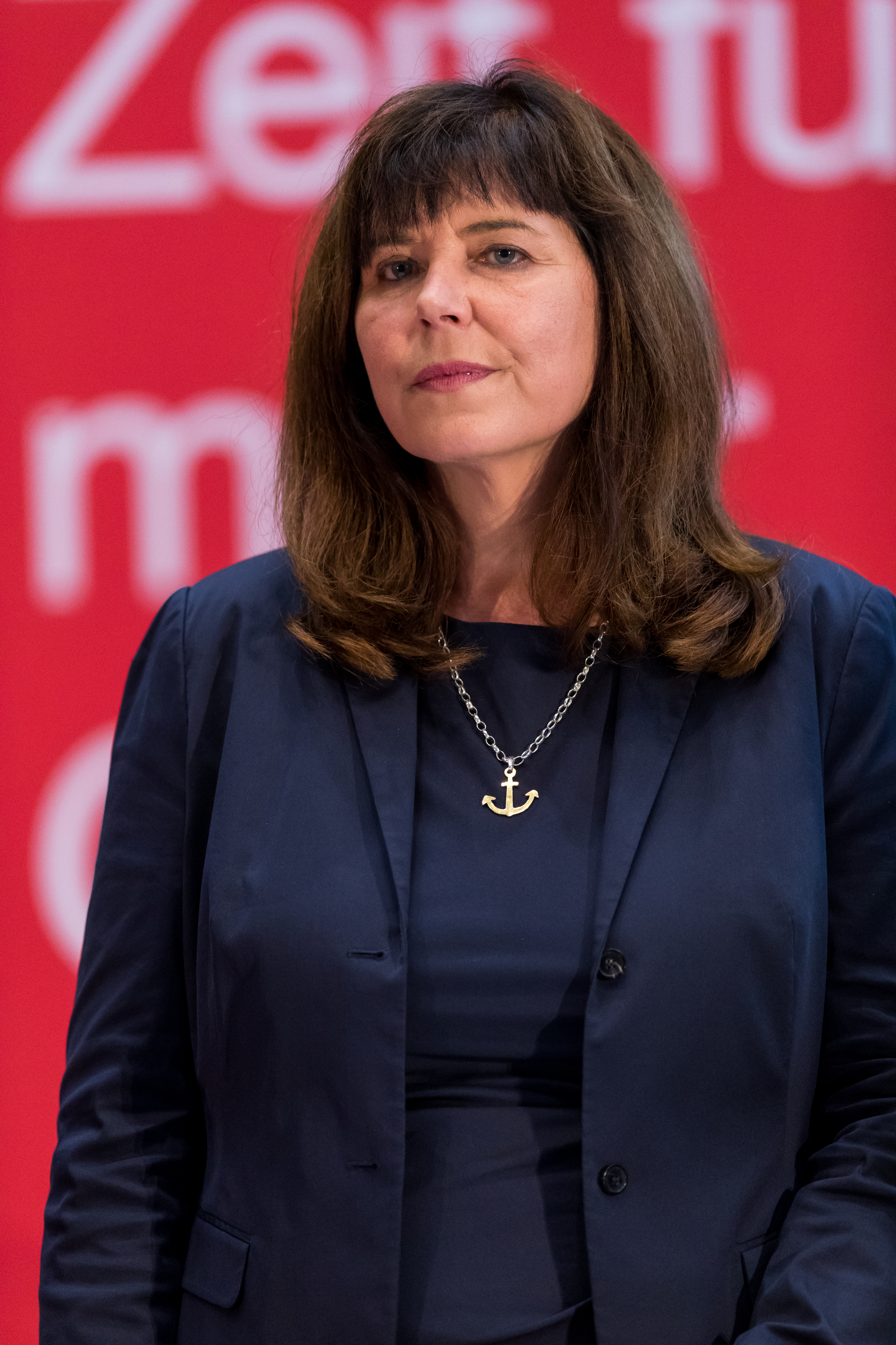 during SPD Wahlkampf Ludwigshafen at Pfalzbau, Ludwigshafen, Rheinland-Pfalz, Germany on 2017-09-13, Photo: Sven Mandel